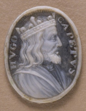 Médaillon représentant Hugues Capet de Profil